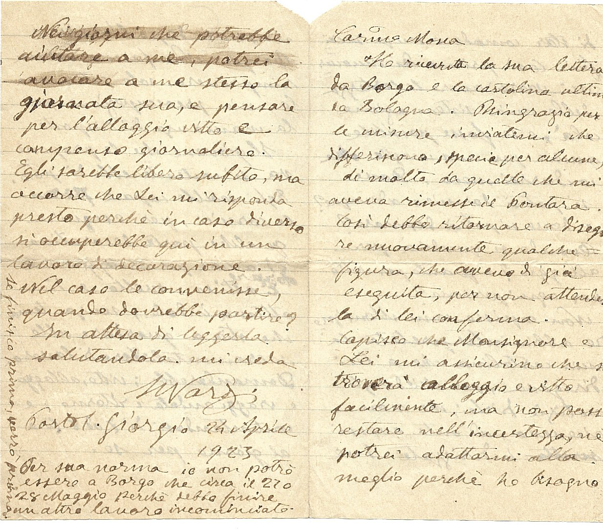 Lettera datata 24.4.1923 spedita da Sigismondo Nardi da Porto San Giorgio a Antonio Mosca Borgo Valsugana